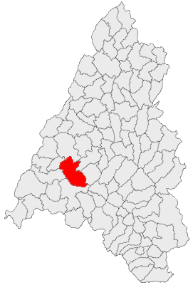 Categorie:Hărţi ale judeţului Bihor